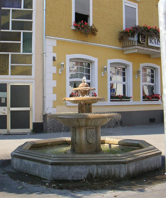 Blick auf den Friedensbrunnen in Lampertheim, Hessen